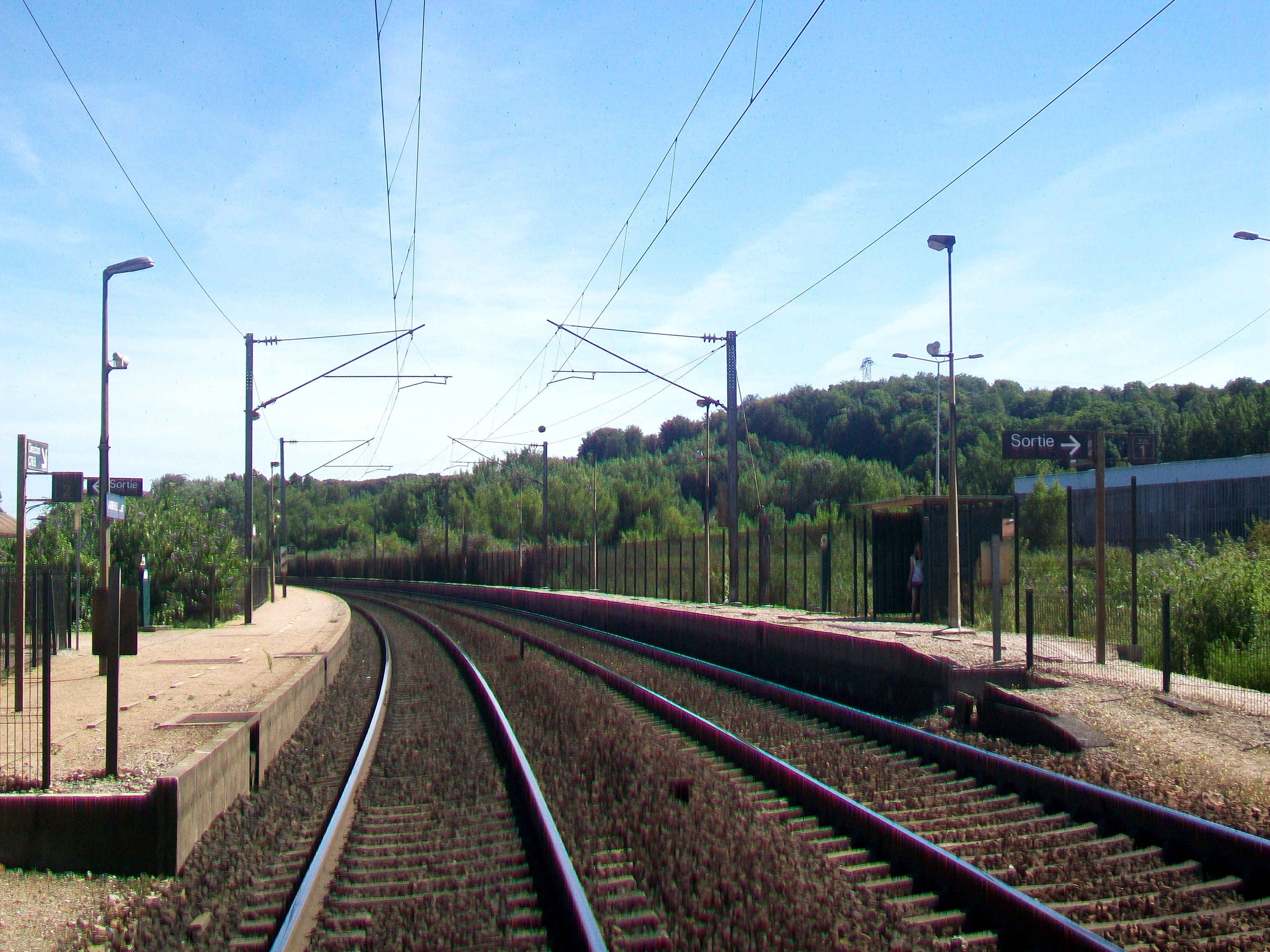 L'arrêt SNCF depuis le passage à niveau, vue en direction de Creil et Paris. A droite, le quai de la voie n° 1 en direction d'Amiens, côté village ; à gauche, le quai de la voie n° 2 en direction de Paris. Ce quai est accessible par le passage à niveau.